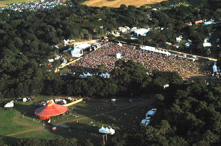 Auteur : Antonin Masset / photographe officiel du Festival du Bout du Monde